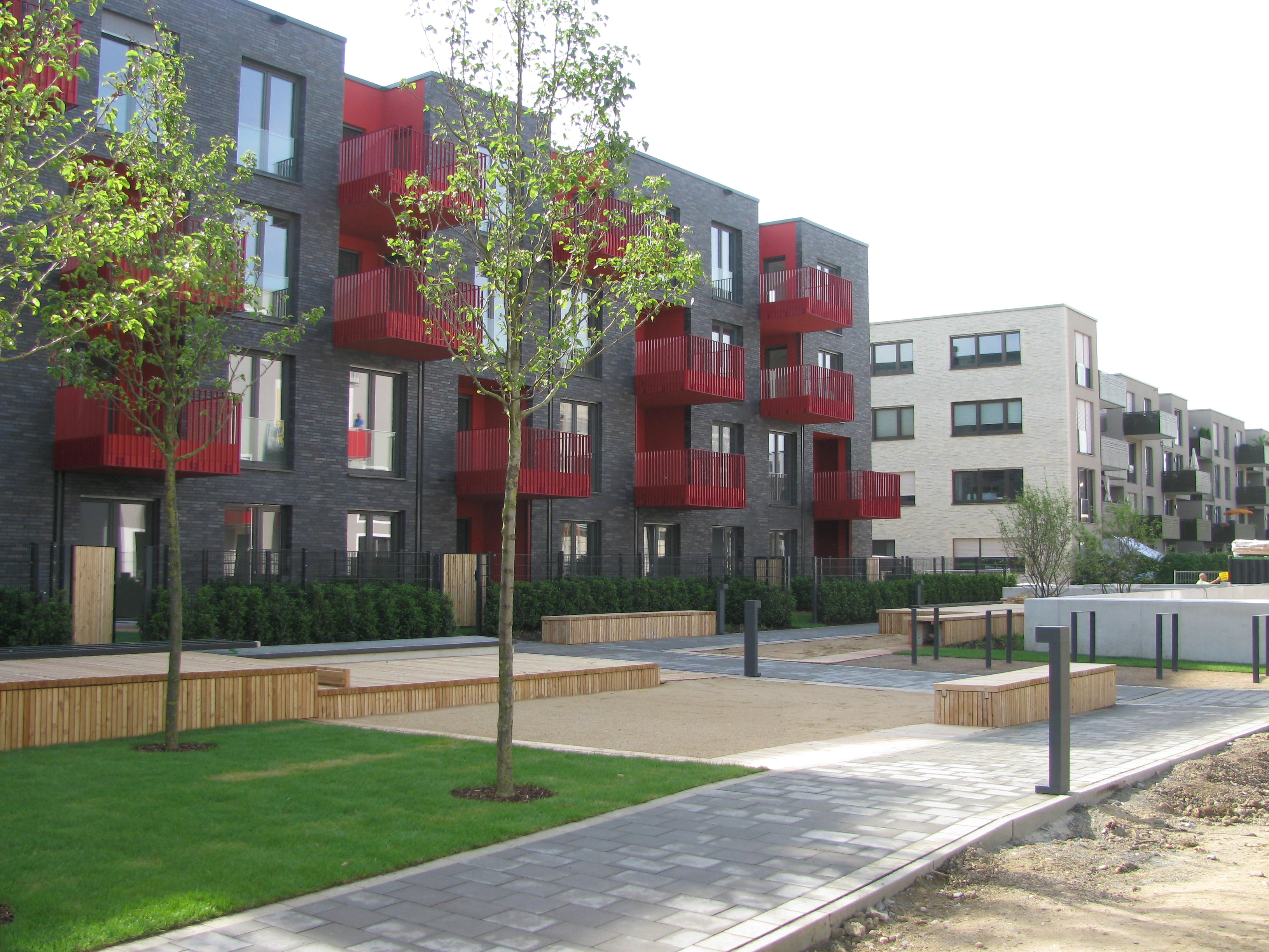 Gartenseite der Wohnblöcke Clouth-3 (dunkle Fassade) und Clouth-M in Köln-Nippes